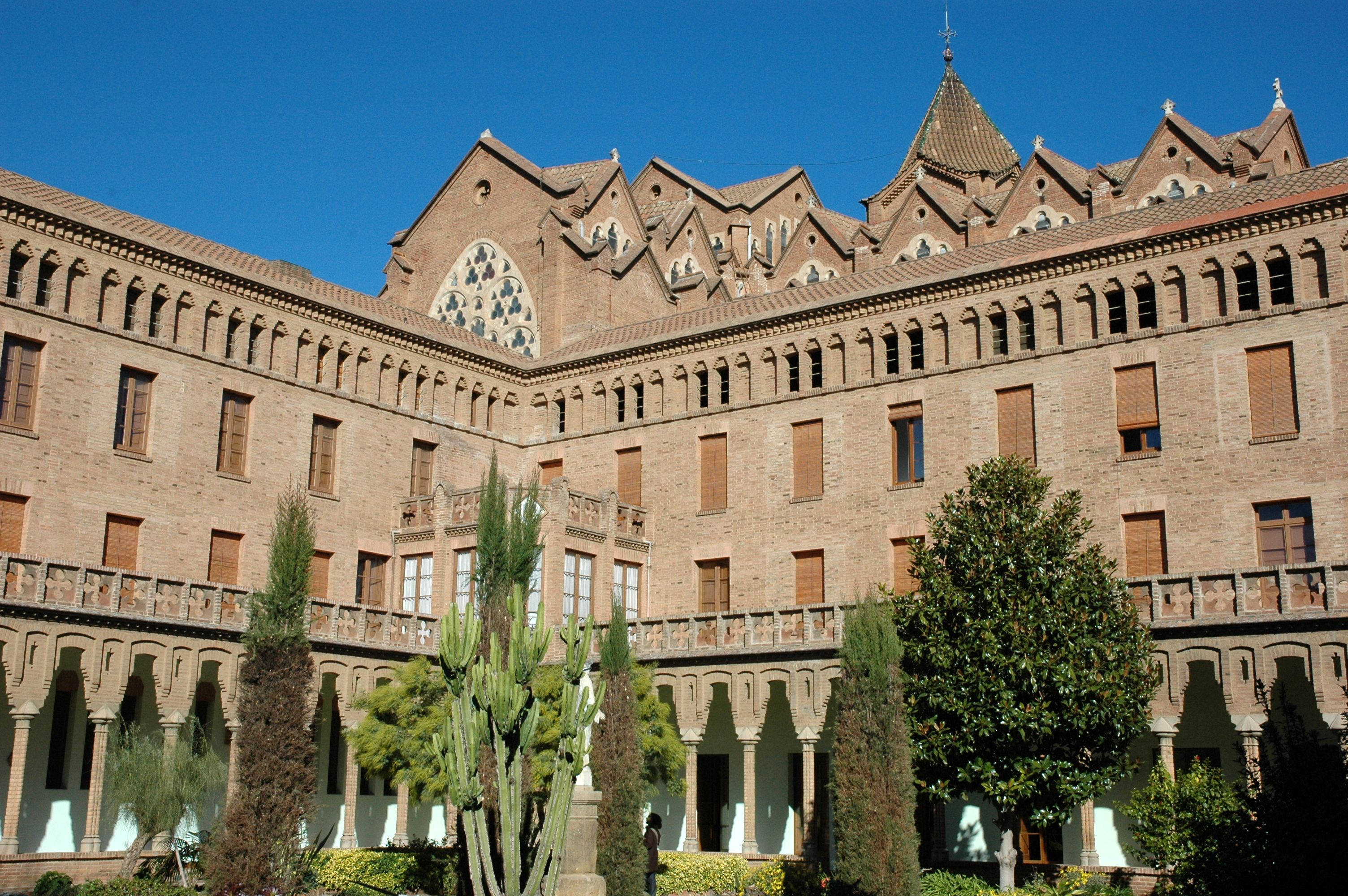 Santa Maria de Valldonzella - Des del claustre